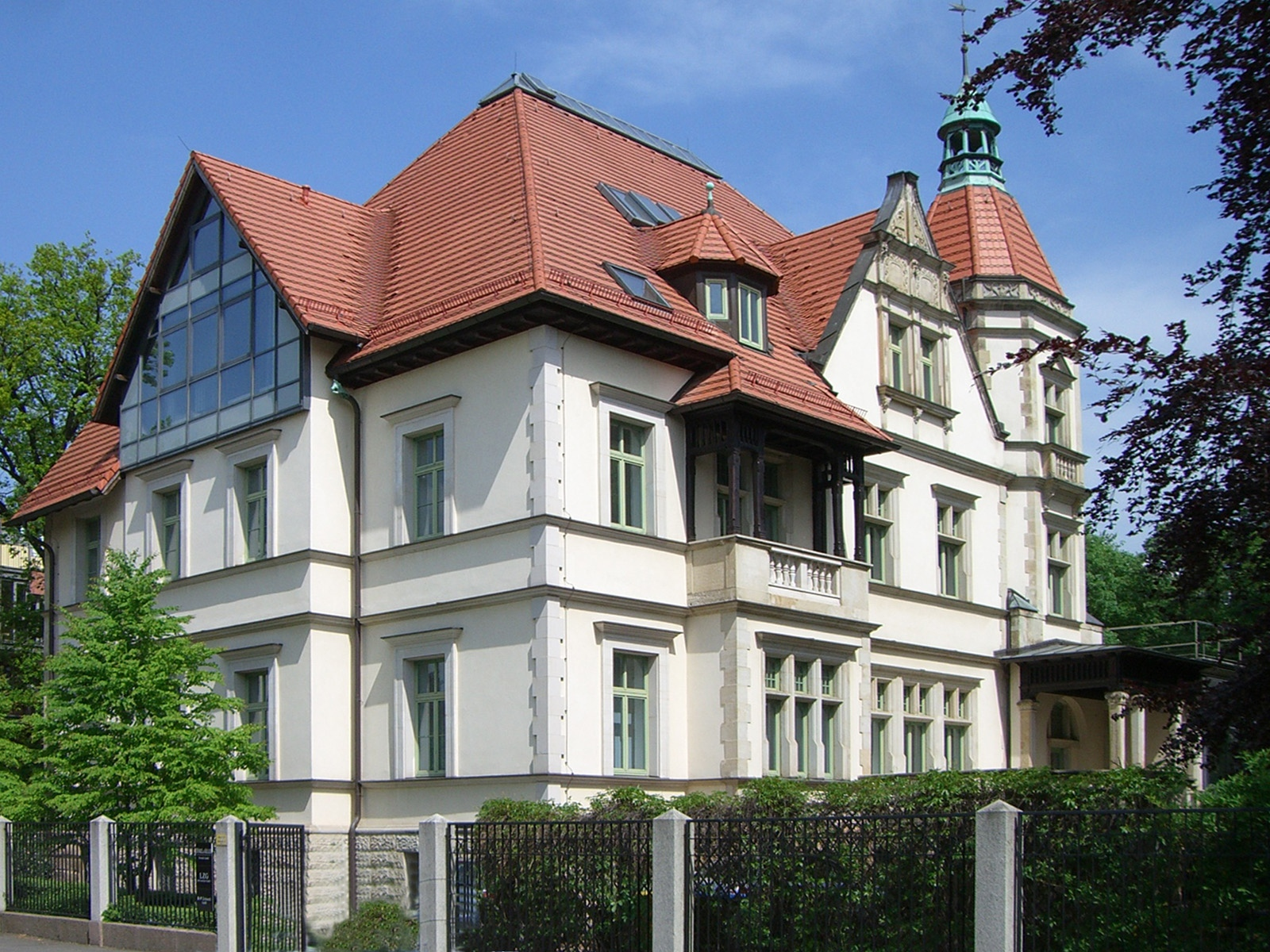 Leipzig, Schwägrichenstraße 23 - Architekt: Peter Dybwad